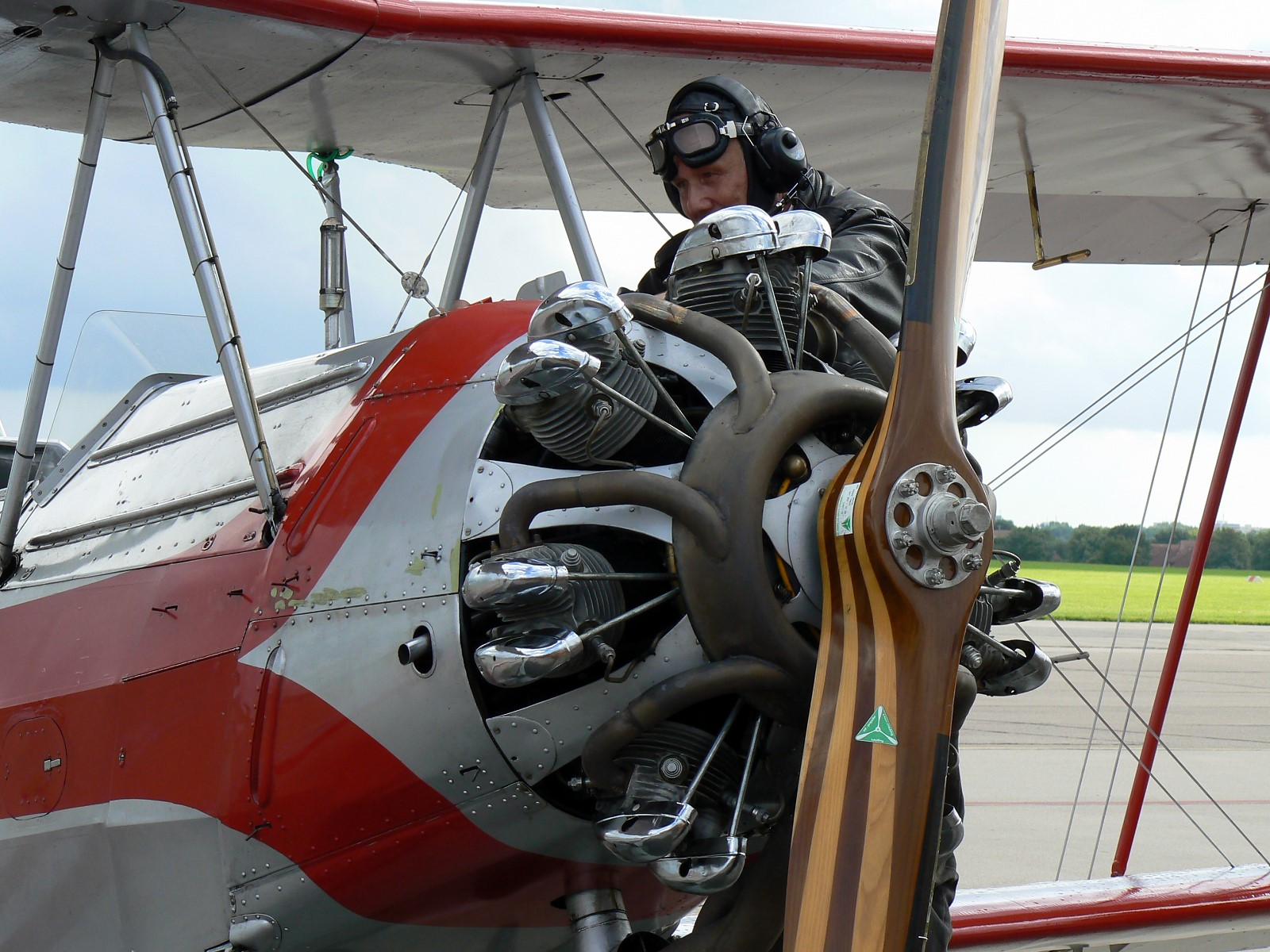 Flugzeug Focke Wulf FW-44 J Stieglitz. Einmotoriger kunstflugtauglicher Doppeldecker.